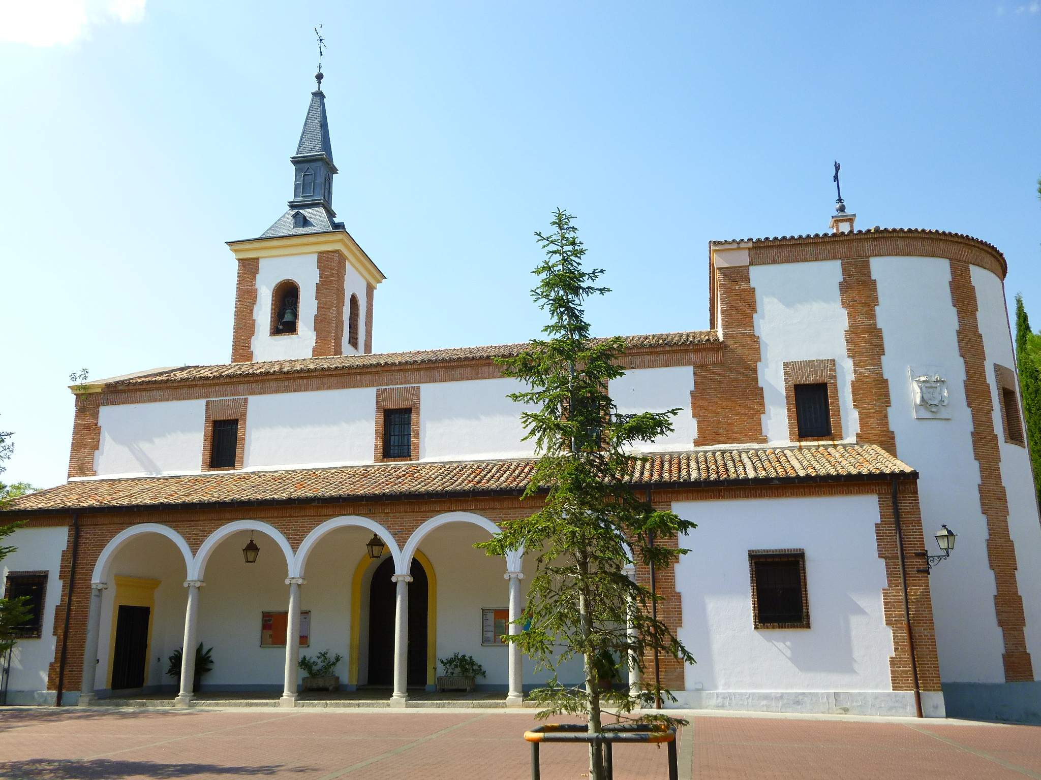 Iglesia de la Asunción de Nuestra Señora. en Aravaca (Madrid)